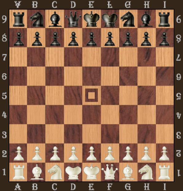 Беларуская (тарашкевіца): Выягляд шахматнай дошкі Беларускіх шахматаў зьверху.